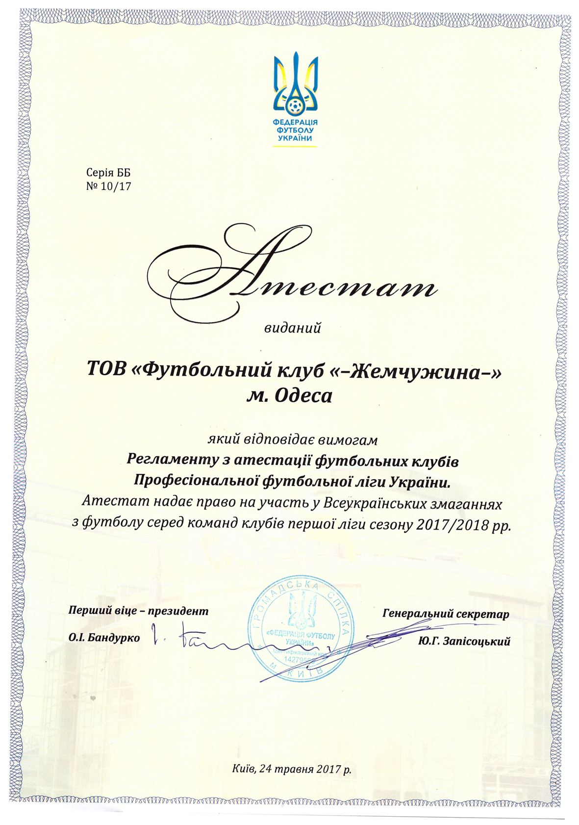 Аттестат